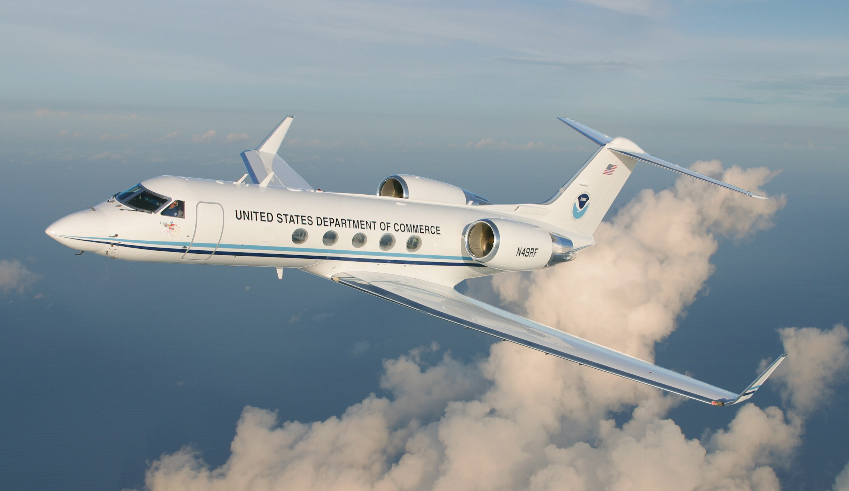 Gulfstream IV-SP (G-IV)